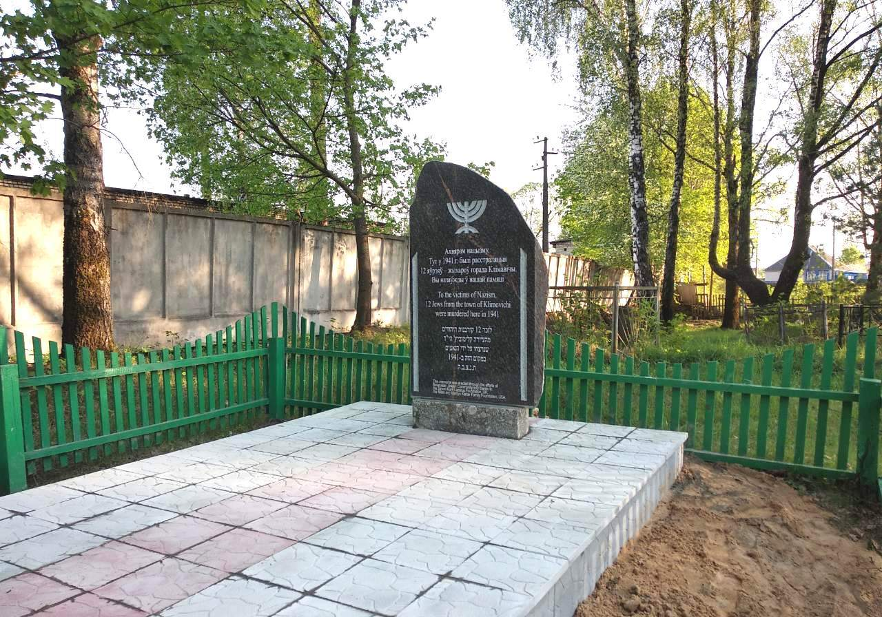 Мемориал на еврейском кладбище в городе Климовичи Могилевской области, где в 1941 году были убиты нацистами и похоронены 12 местных евреев.